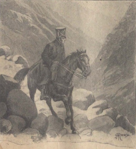 José Antonio Álvarez Condarco al ser enviado a Chile por San Martín.